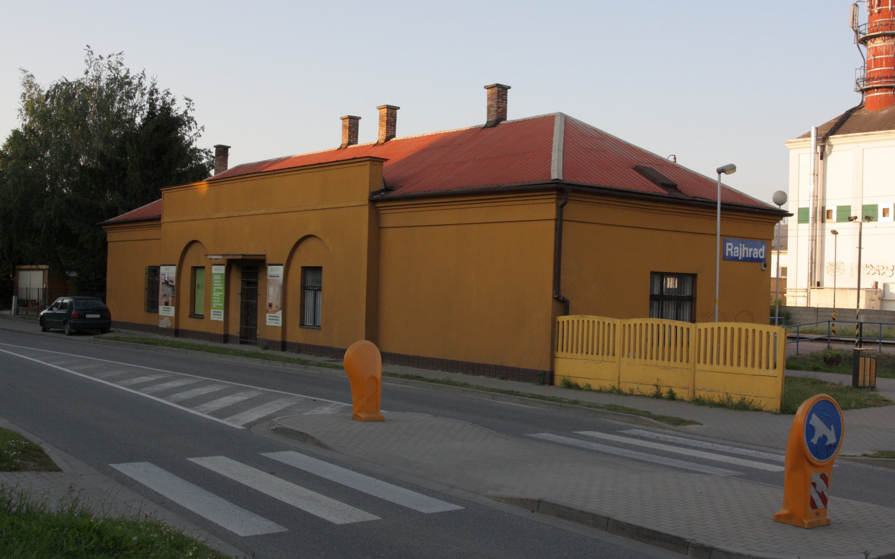 Rajhrad - nádraží.